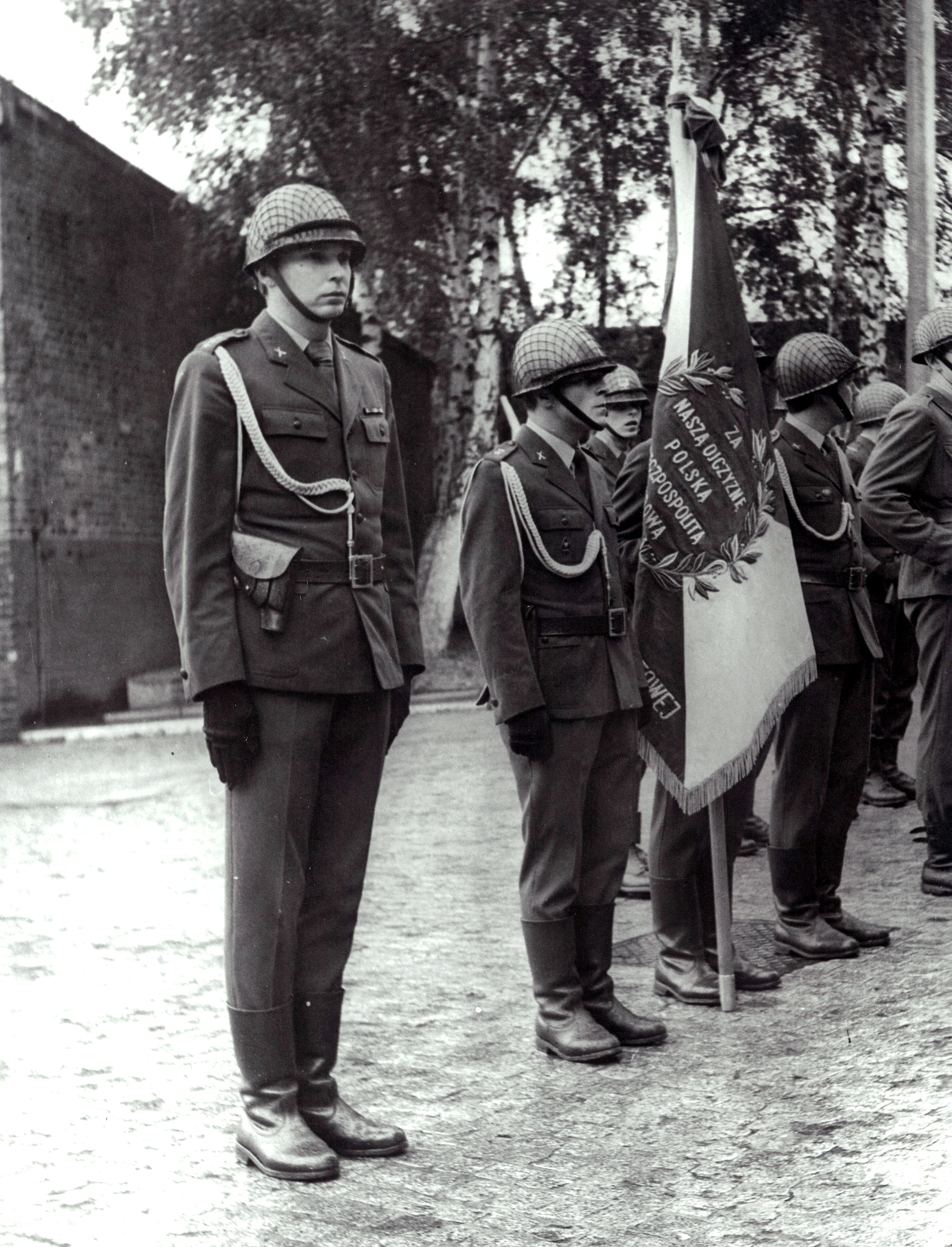 Poczet sztandarowy 22 drt ze Szczecina